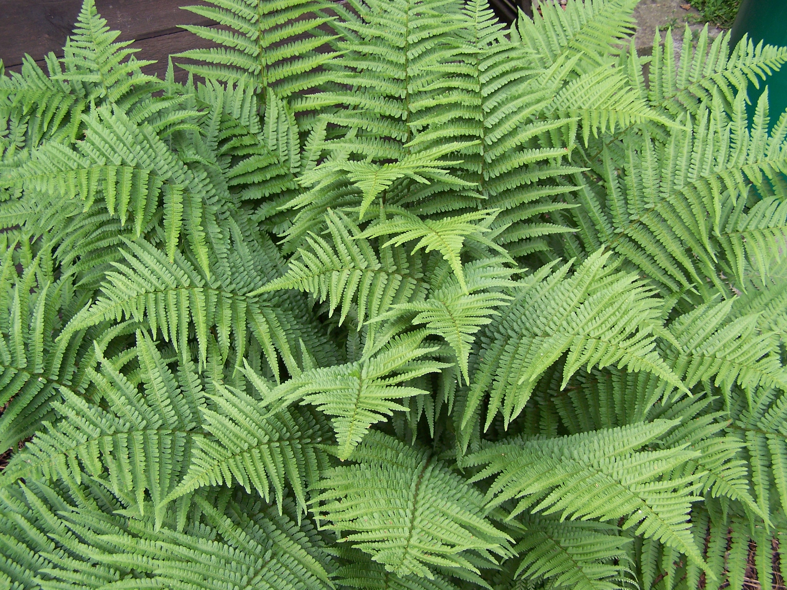 Dryopteris filix-mas 17 juin 2006 Vieux jardin botanique de Göttingen